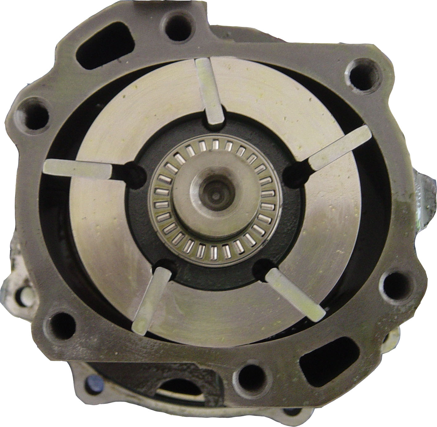 Pompe à palette de climatisation automobile (BMW 728i de 1982) fonctionnant au fréon. Auteur : Xavier Lory.